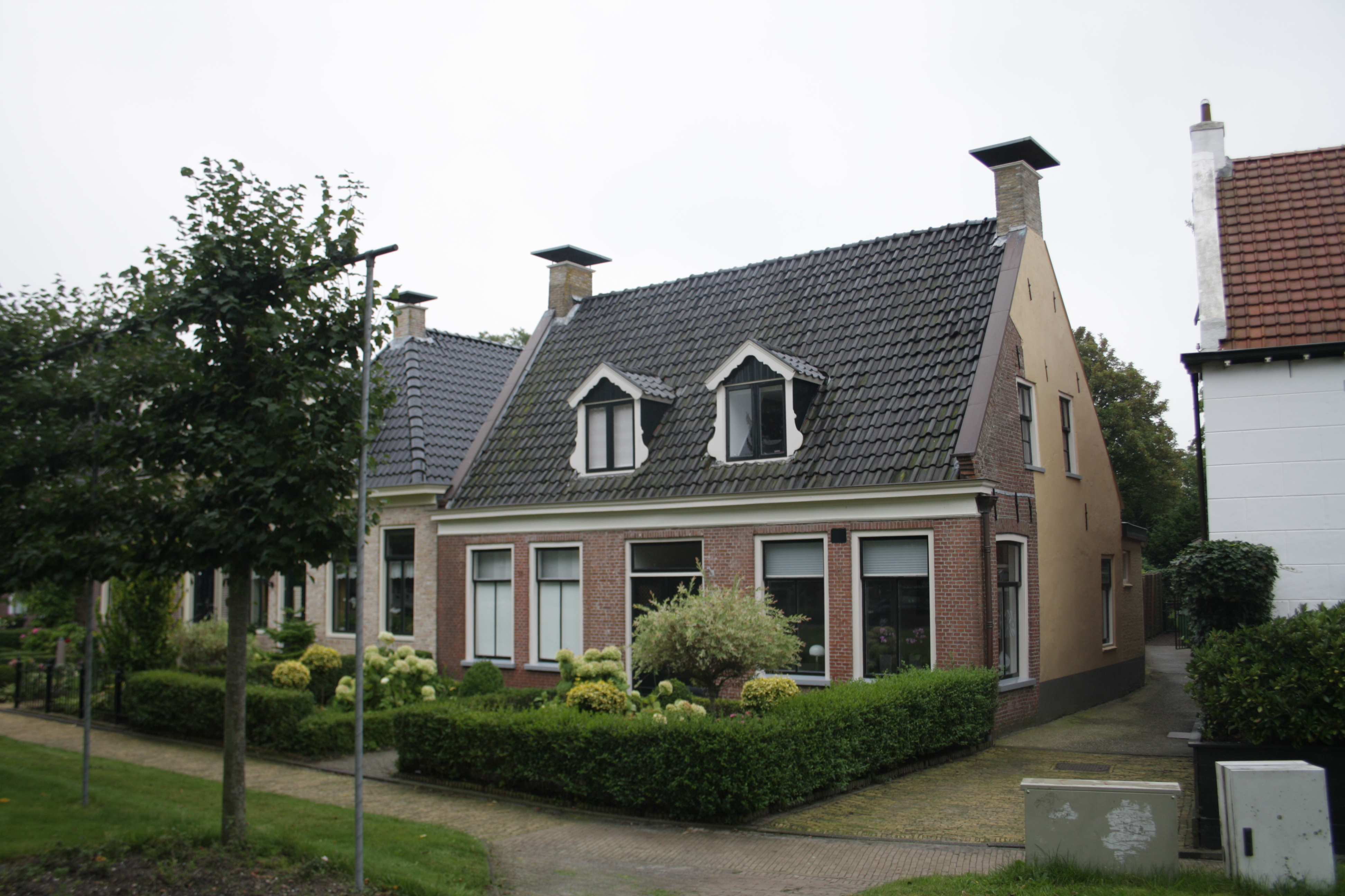 Brêgebuorren 13 te Dronrijp